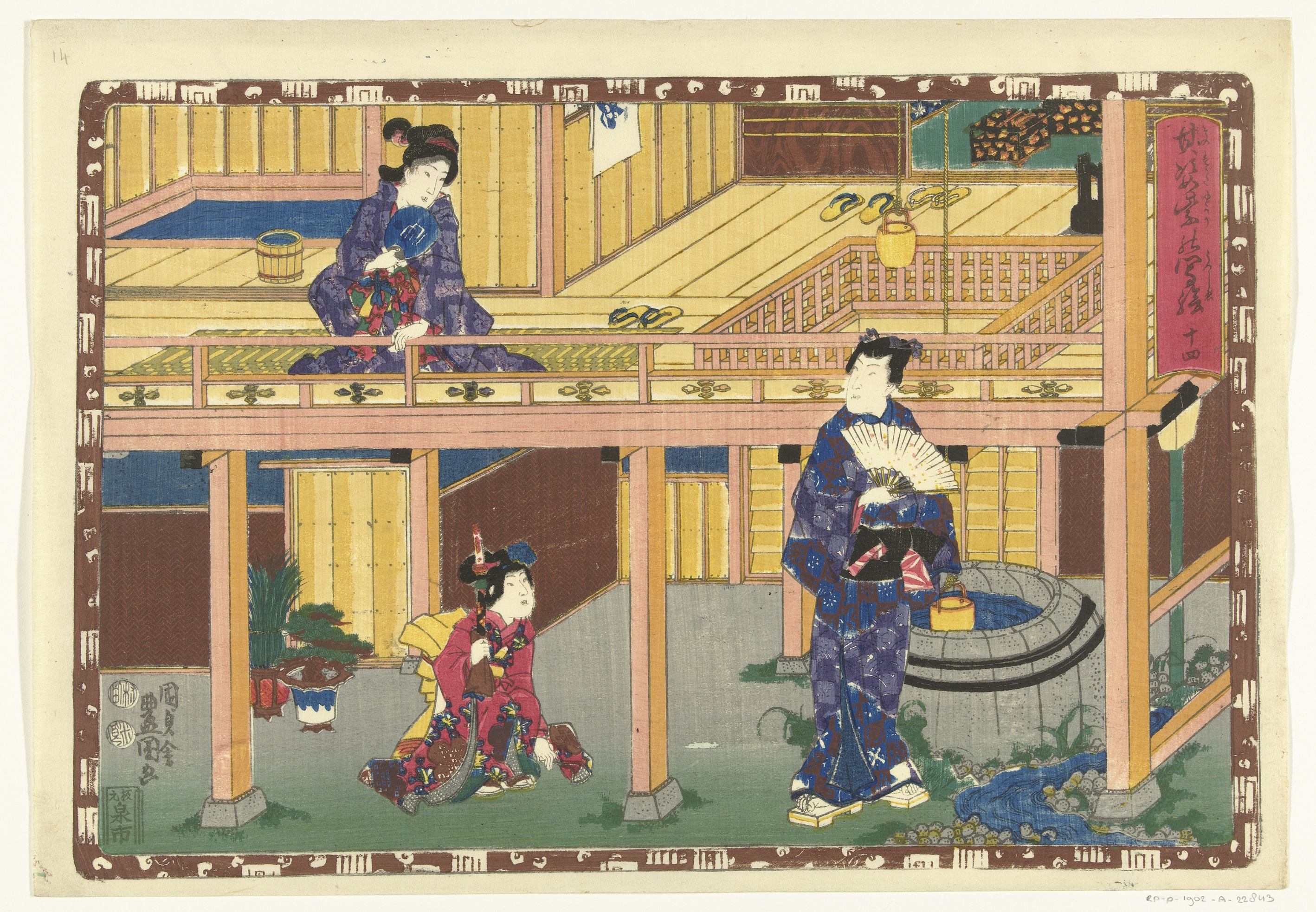 Prins Genji met waaier staand bij waterput, kijkend naar vrouw zittend op veranda van eerste verdieping; een dienstmeisje met zwaard in rechter hand kijkt toe. Voorstelling omsloten door bruine rand waarin Genji emblemen. Label Line: mentioned on object Kunisada (I) , Utagawa (1786 - 1865), 1847 - 1850, kleurenhoutsnede; lijnblok in zwart met kleurblokken Collection: prenten; Japan (collectie)